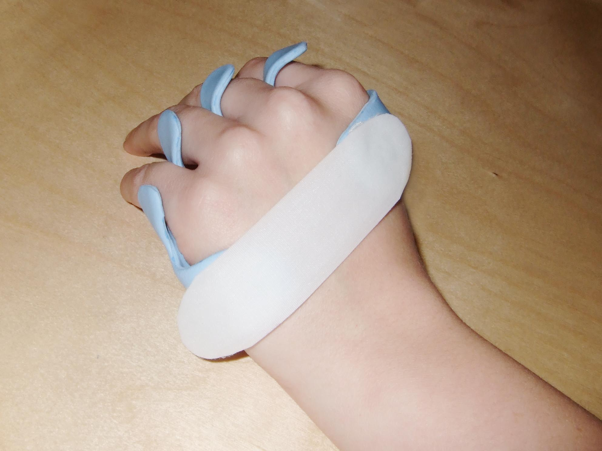 AUD-Spange. AUD steht für Anti-Ulnar-Deviation.